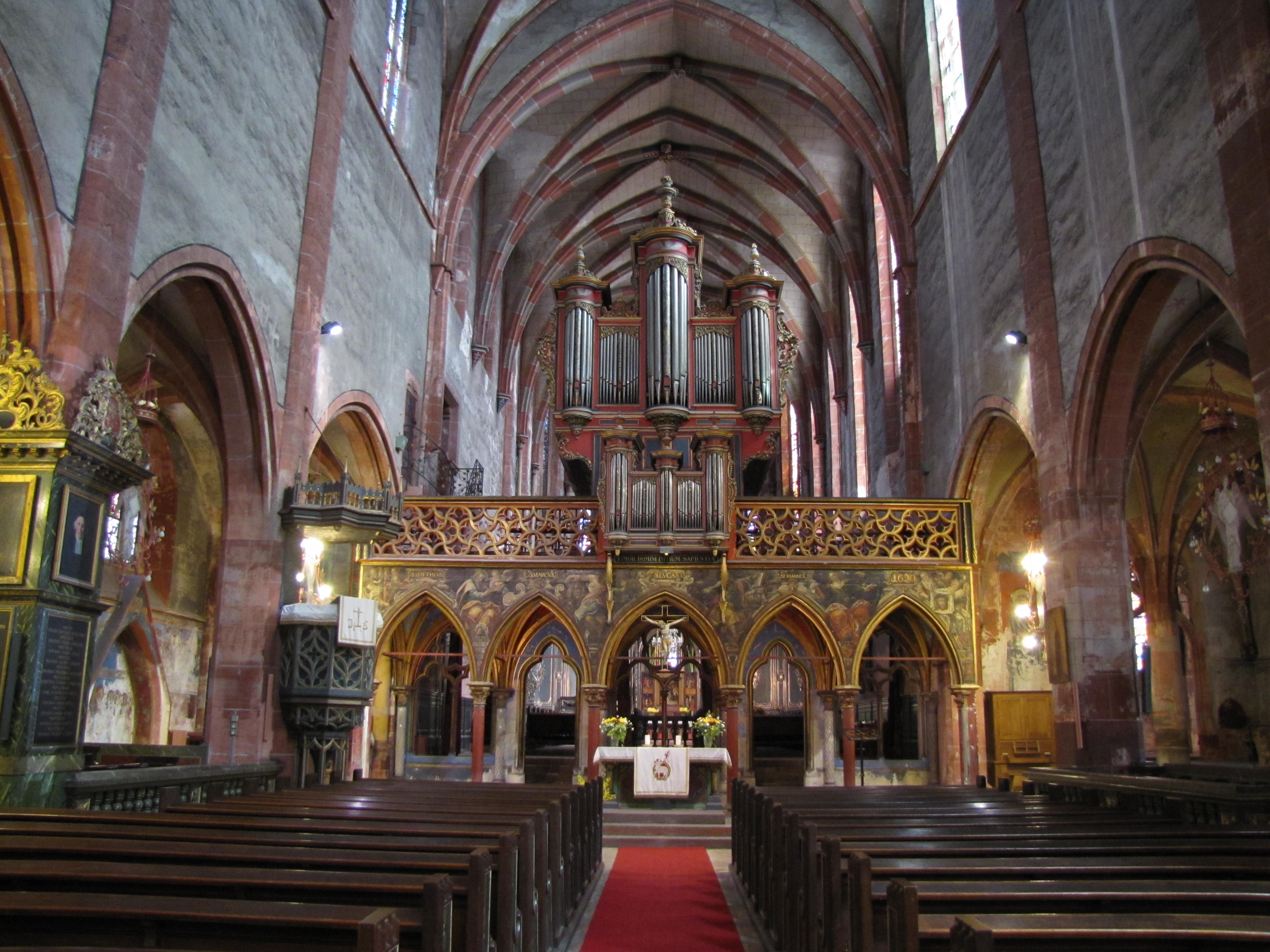 Alsace, Bas-Rhin, Église protestante Saint-Pierre-le-Jeune de Strasbourg (PA00085030). Vue intérieure de la nef vers le jubé et le chœur